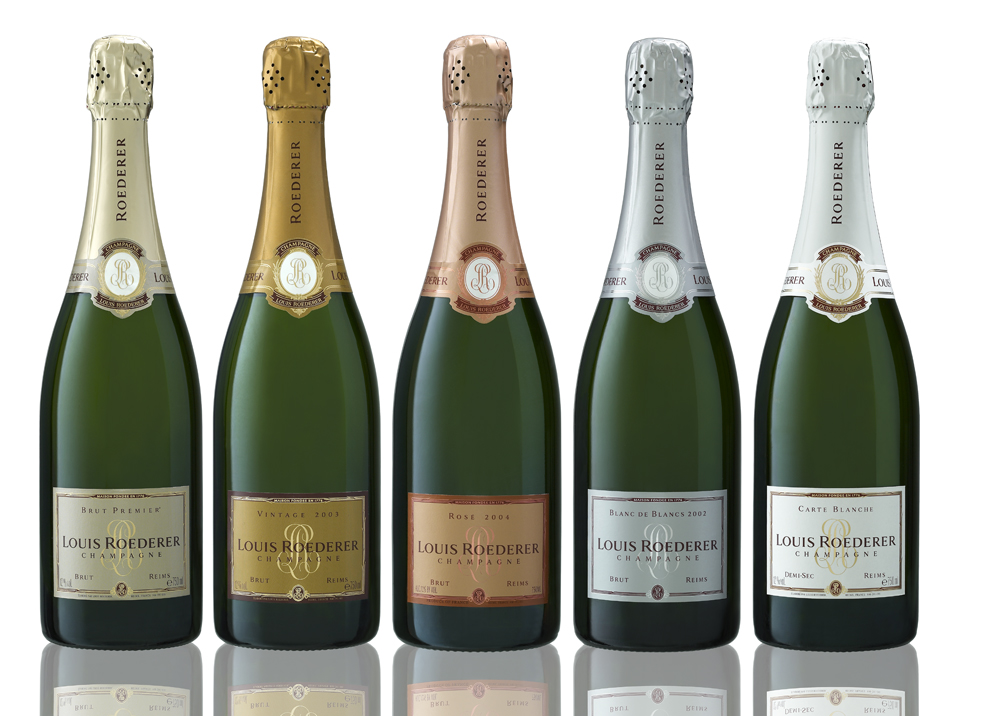 Gamme Champagne Louis Roederer